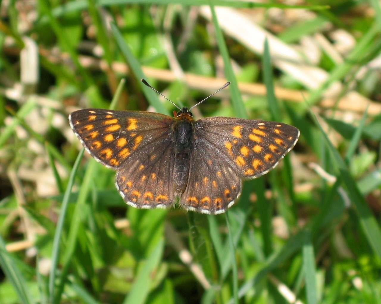 Brauner Würfelfalter Hamearis lucina